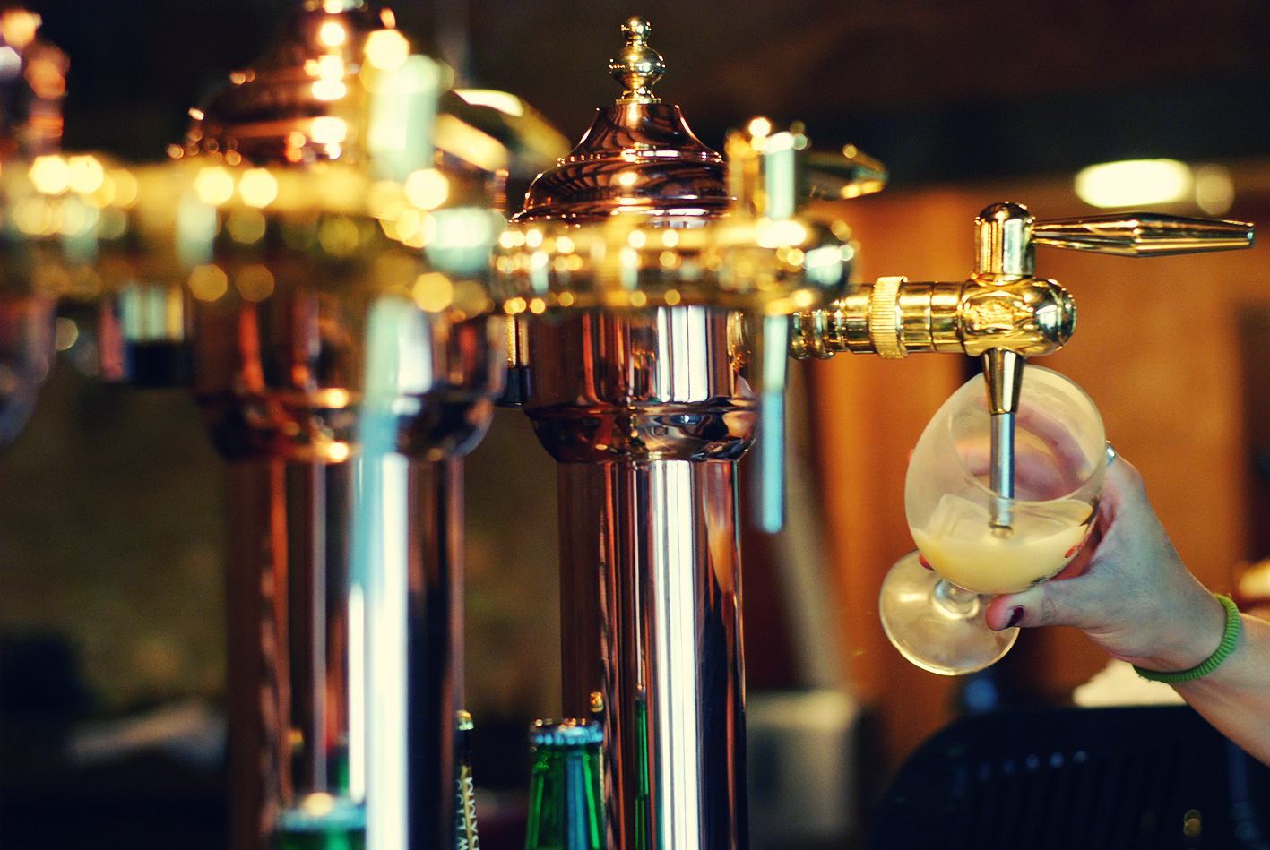 Sirviendo una cerveza con un serpentín.